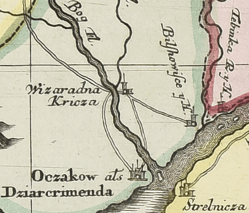 Частка мапи "Nova mappa maris Nigri et freti Constantinopolitani quam exactissime consignata et in lucem edita / per Matth. Seutter"